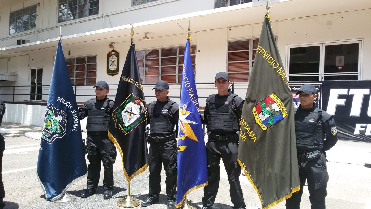 Banderas Institucionales de los diferentes estamentos de la fuerza publica panameña